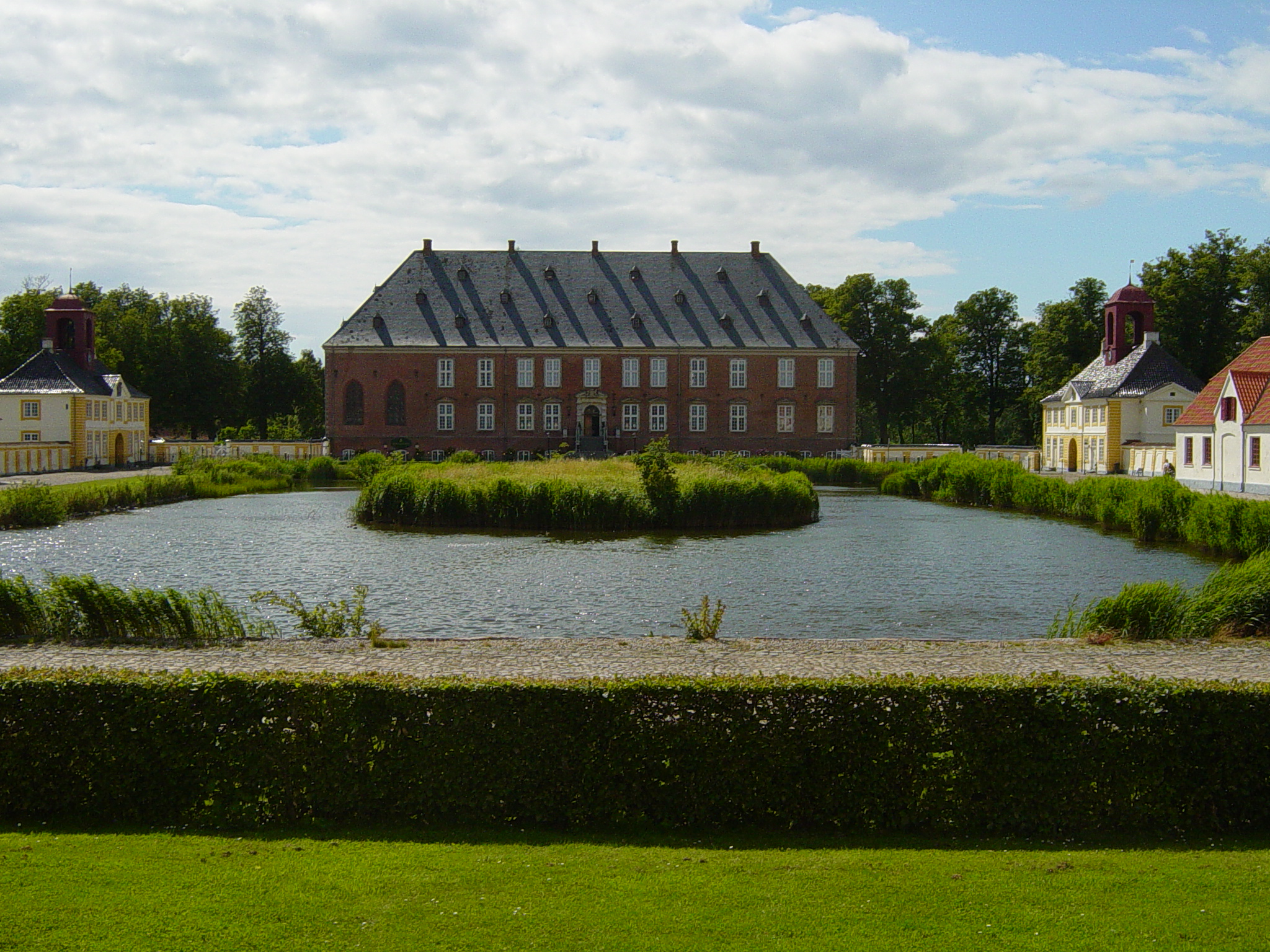 Valdemars Slot, Denmark